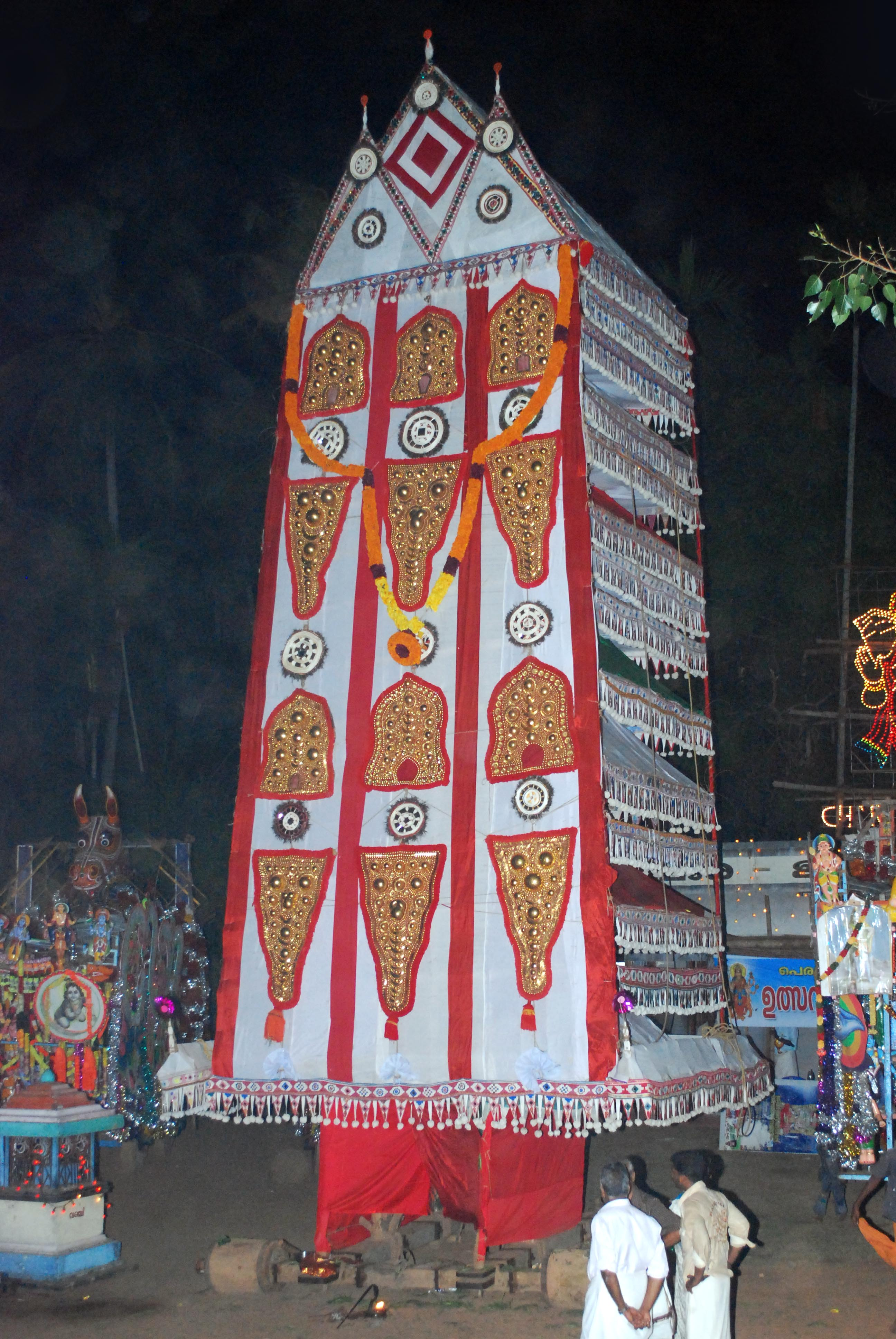 പെരുമൺ തേര്